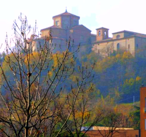 L'Abbazia di Santa Maria del Monte vista dall'Ospedale.